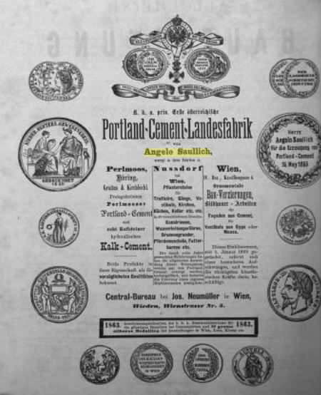 Werbeanzeige mit Auszeichnungen für Angelo Saullichs Portland-Zement etc.